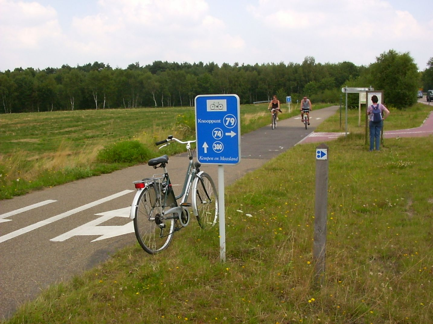 Fietsknooppunt 79 in Genk